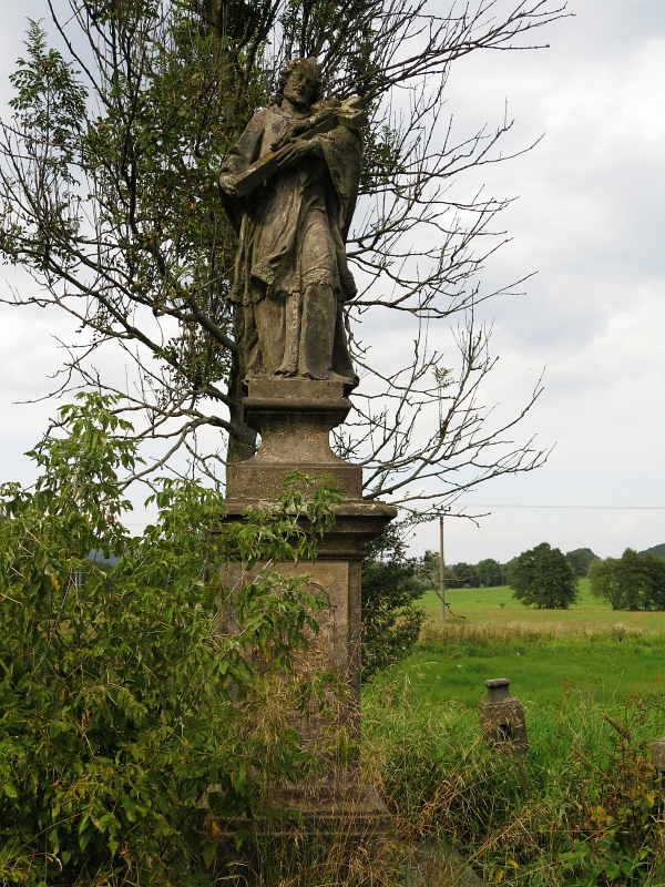 Socha svatého Jana Nepomuckého, při silnici na Žďár, Velké Chvojno.